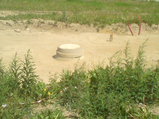 Studna na staveništi